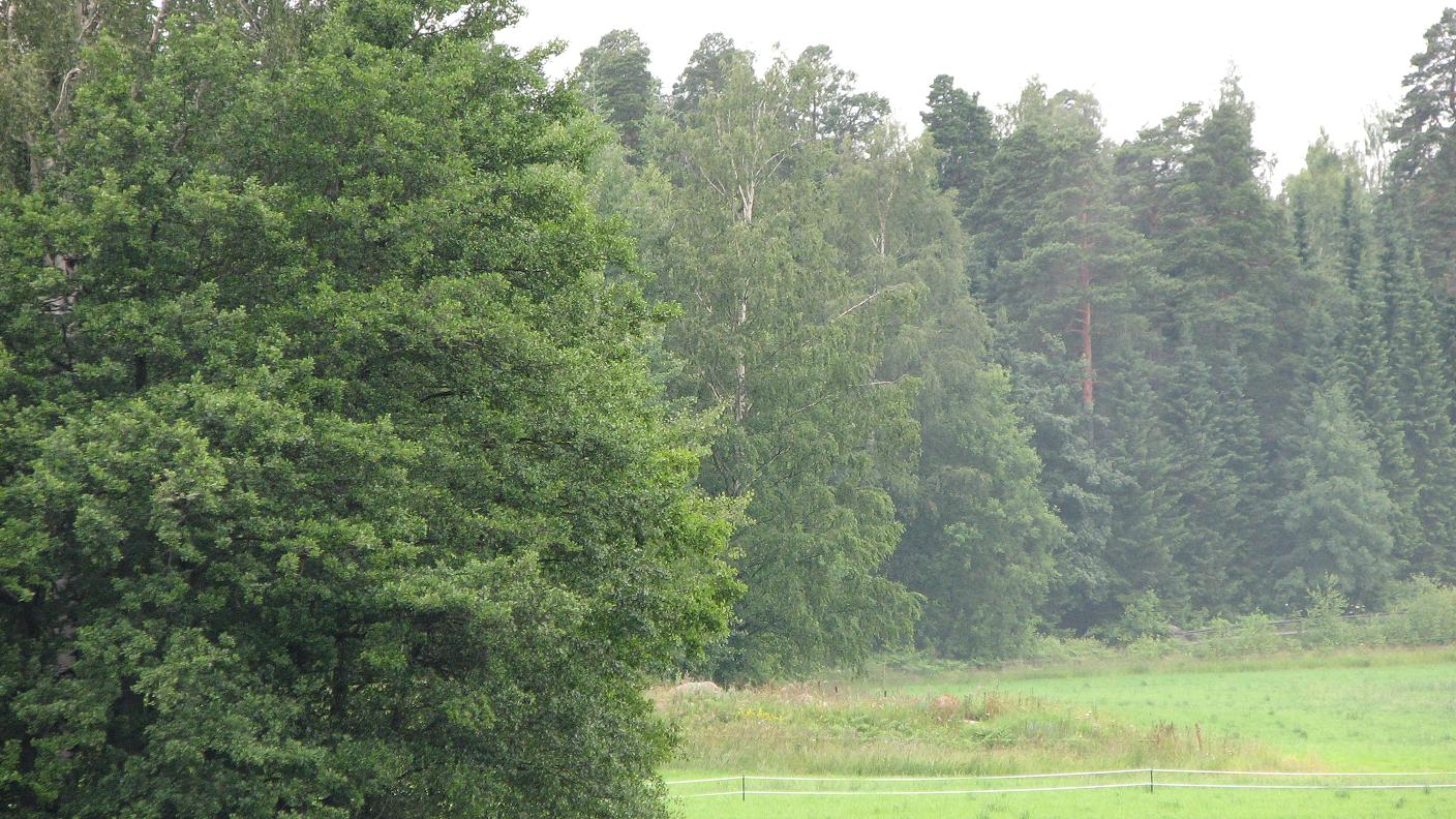 Metsää Viikissä, puupuiston ulkopuolelta, idästä päin kuvattuna